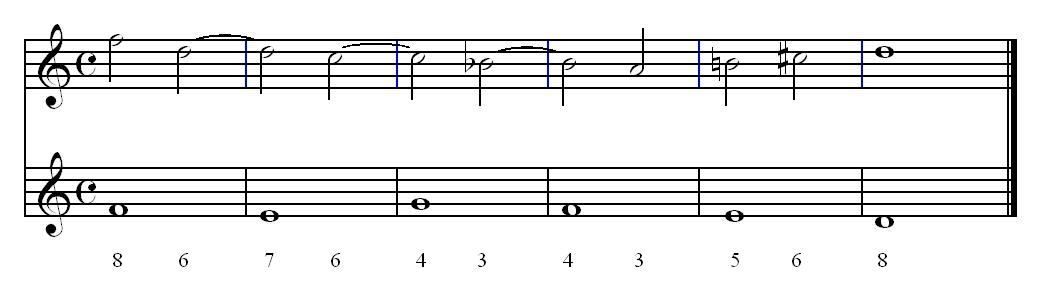 Näide kontrapunkti 4. järgu kohta, kus cantus firmusele (alumine hääl) on lisatud pidedissonantsidega kontrapunkt. Kasutatud on programme Finale 2005 ja MS Paint.